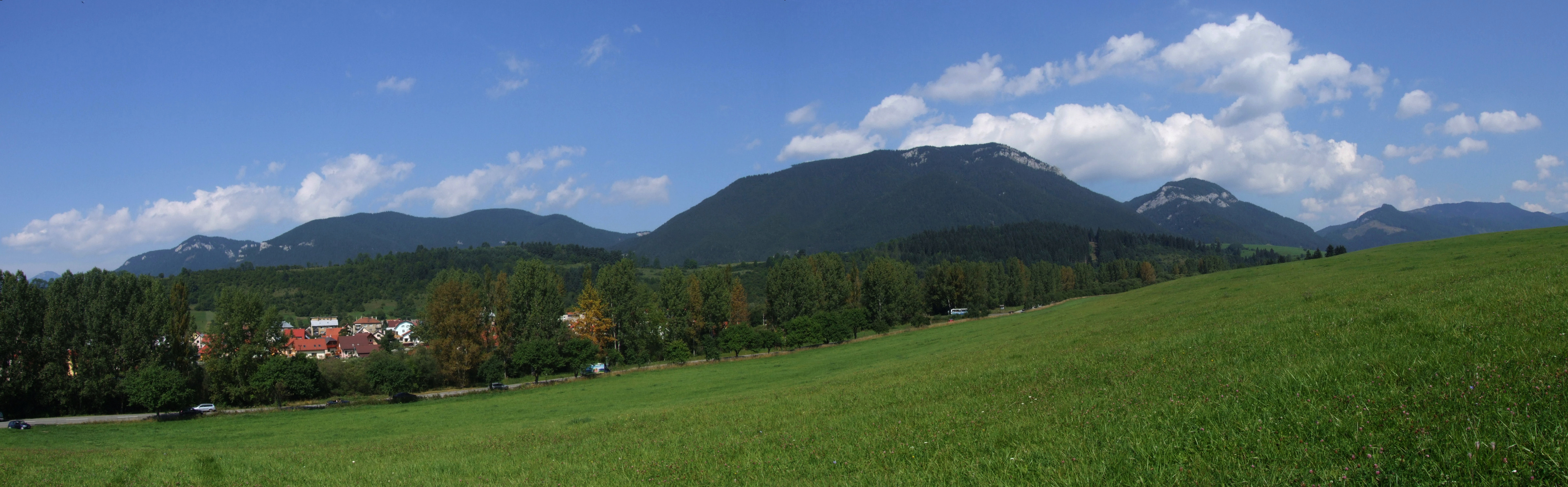 Chočské vrchy (Góry Choczańskie)